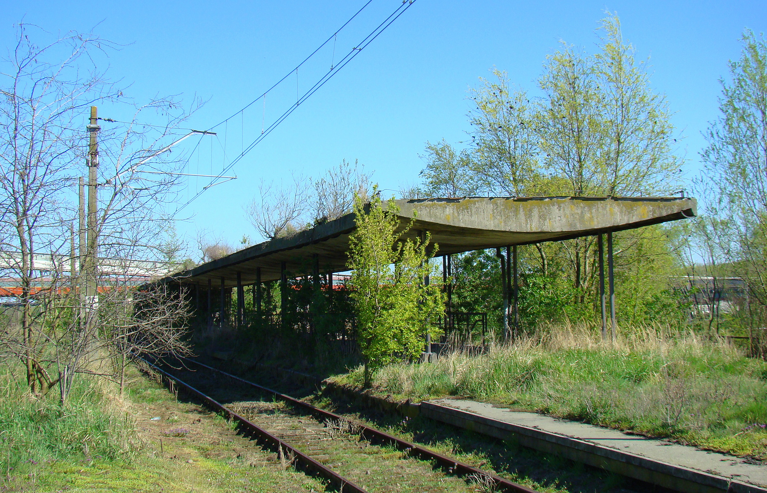 Police Zakład, przystanek kolejowy (nieczynny), Police, Polska